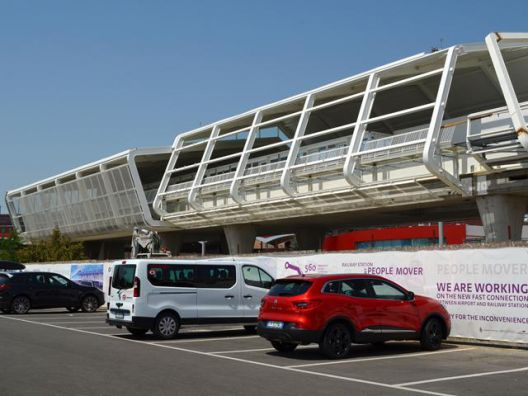 Stazione di partenza del People Mover all'aeroporto in costruzione